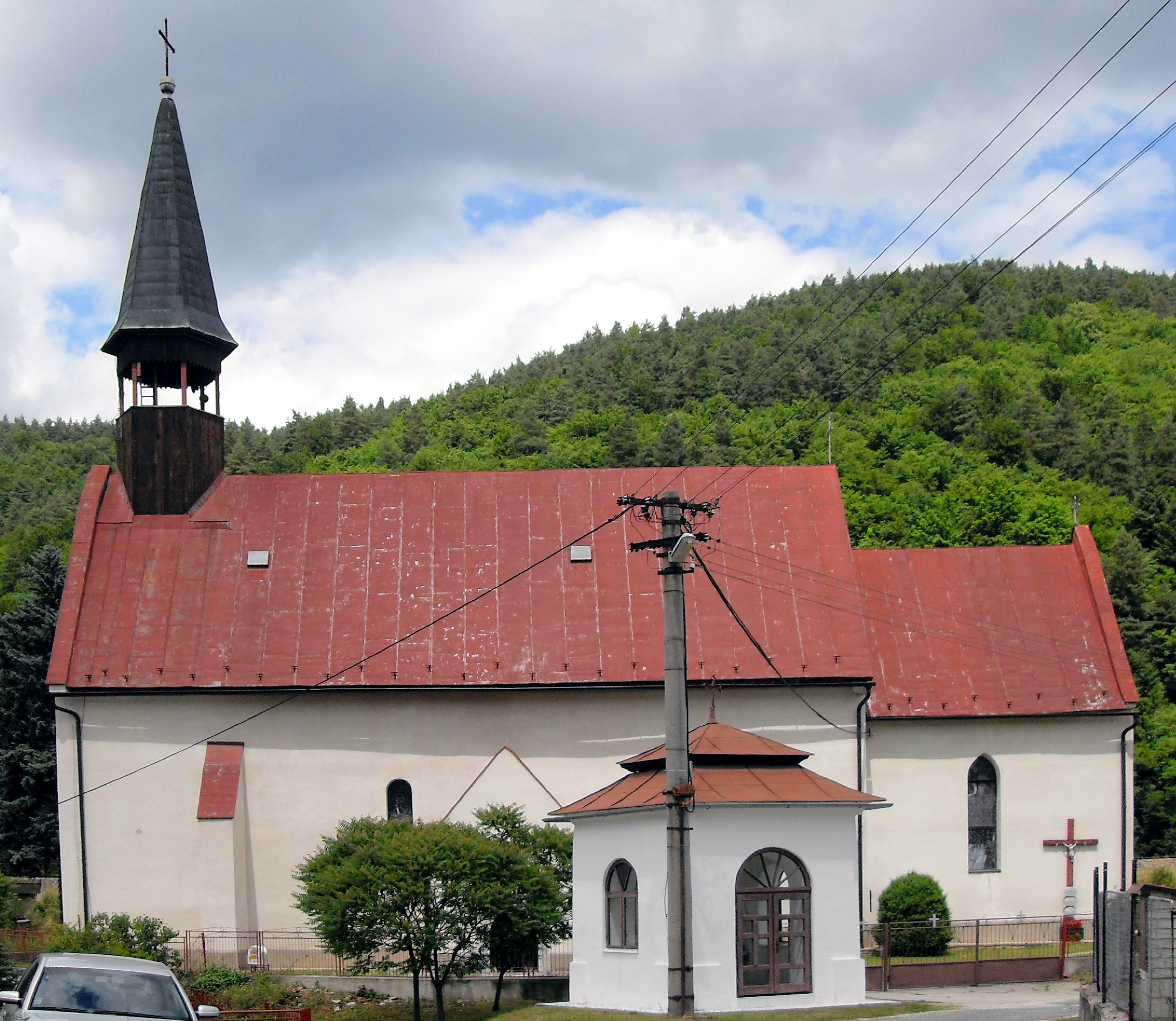 Kostol Sv. Antonia v Jaklovce